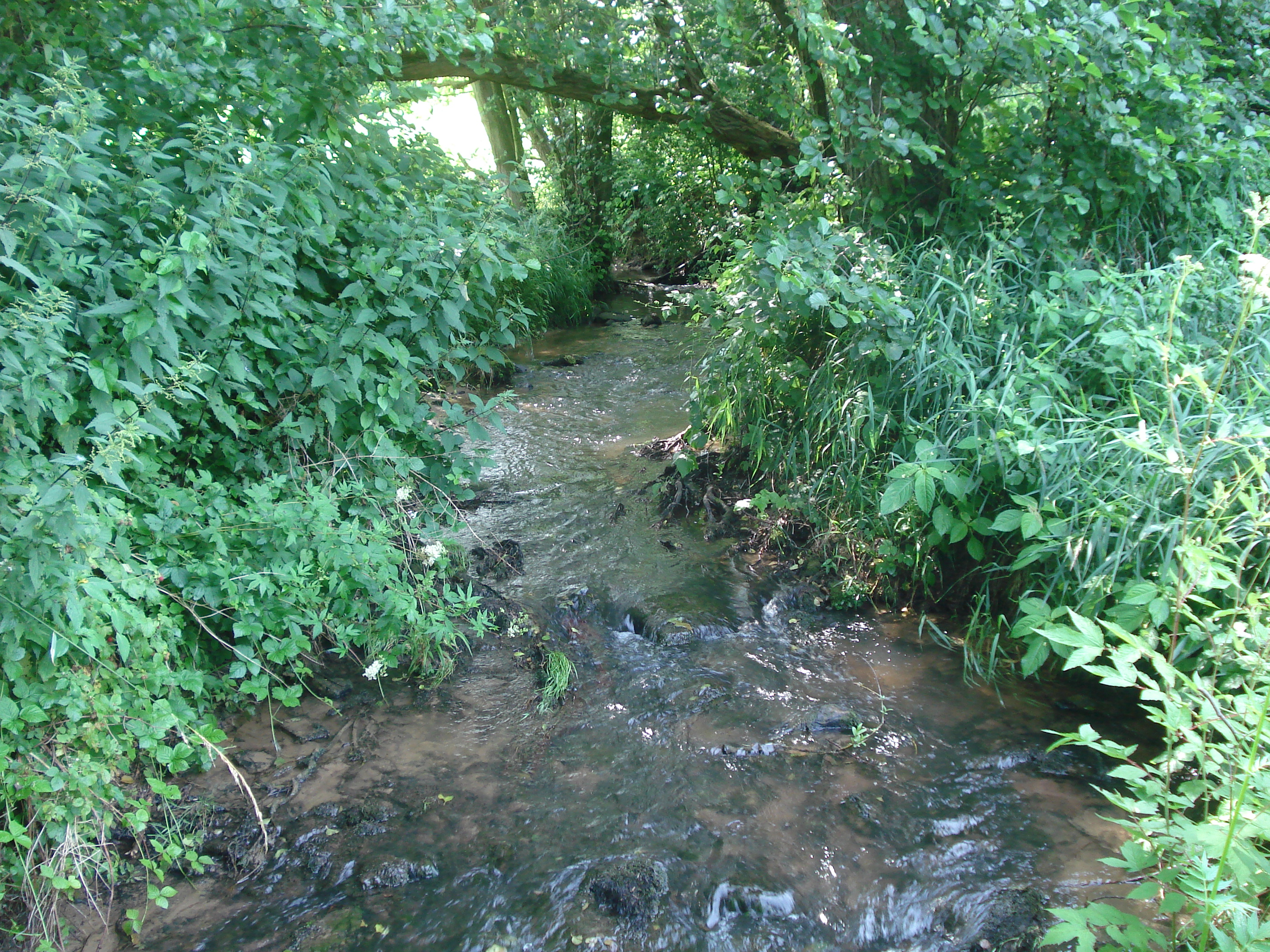 Der Aubach bei Eschau